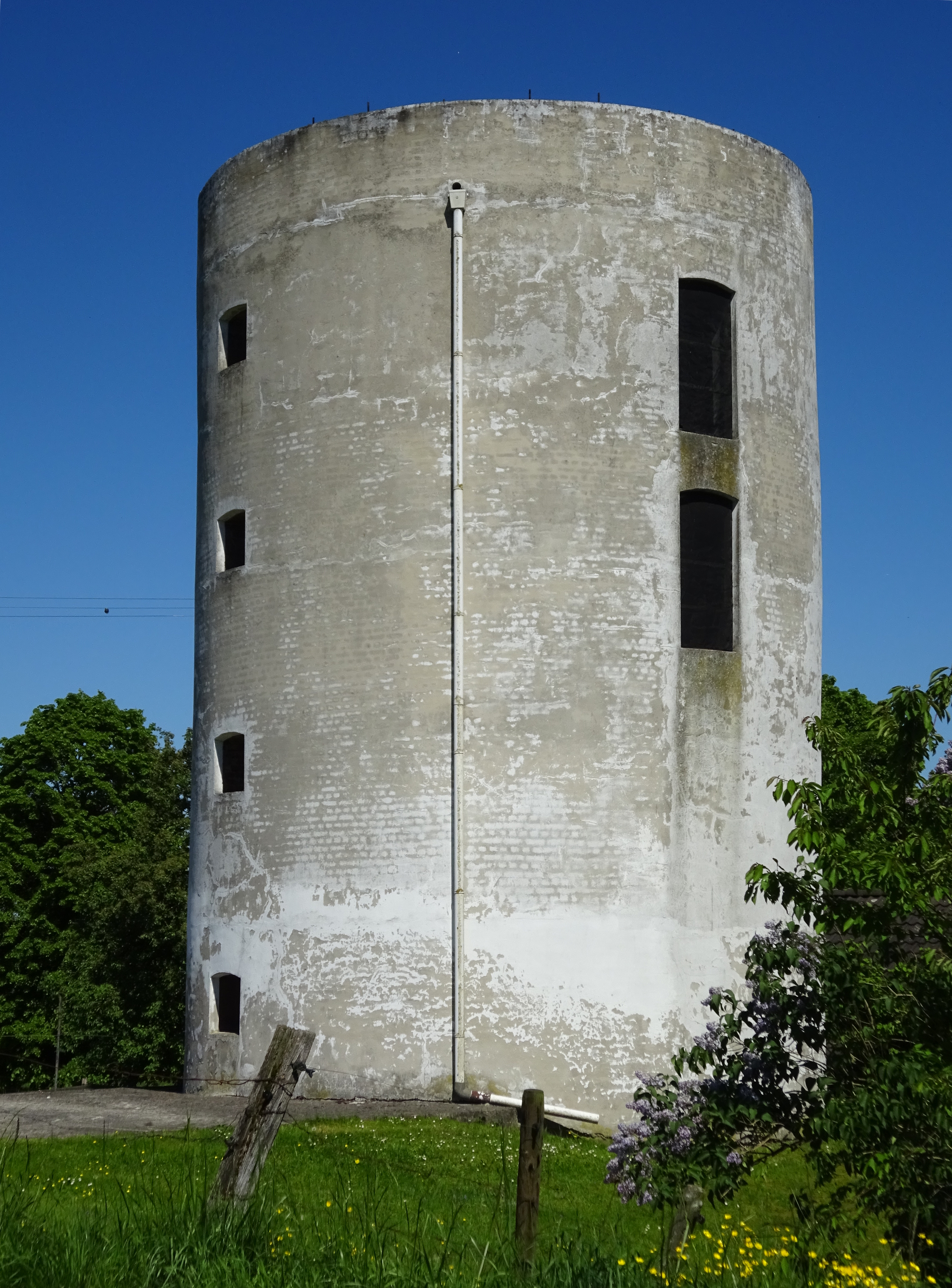 Mühle Rosau, Zur Rosau 30, Rees-Bienen This is a photograph of an architectural monument. 19